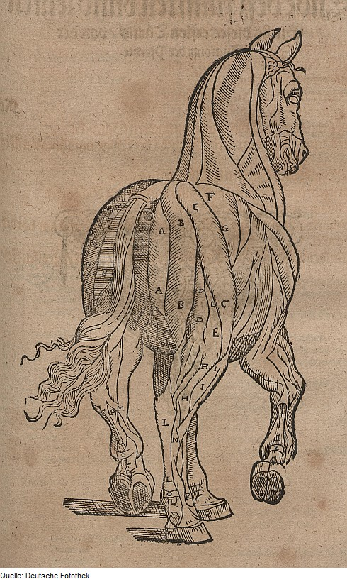 Original image description from the Deutsche FotothekBiologie & Veterinärmedizin & Pferd